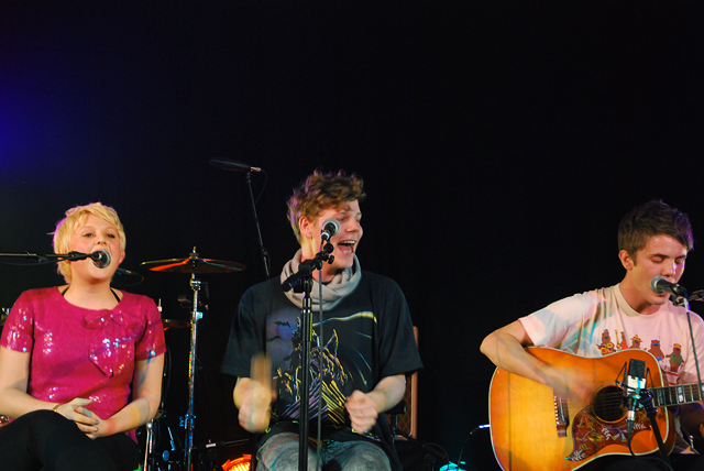 acoustical alphabeat fun.